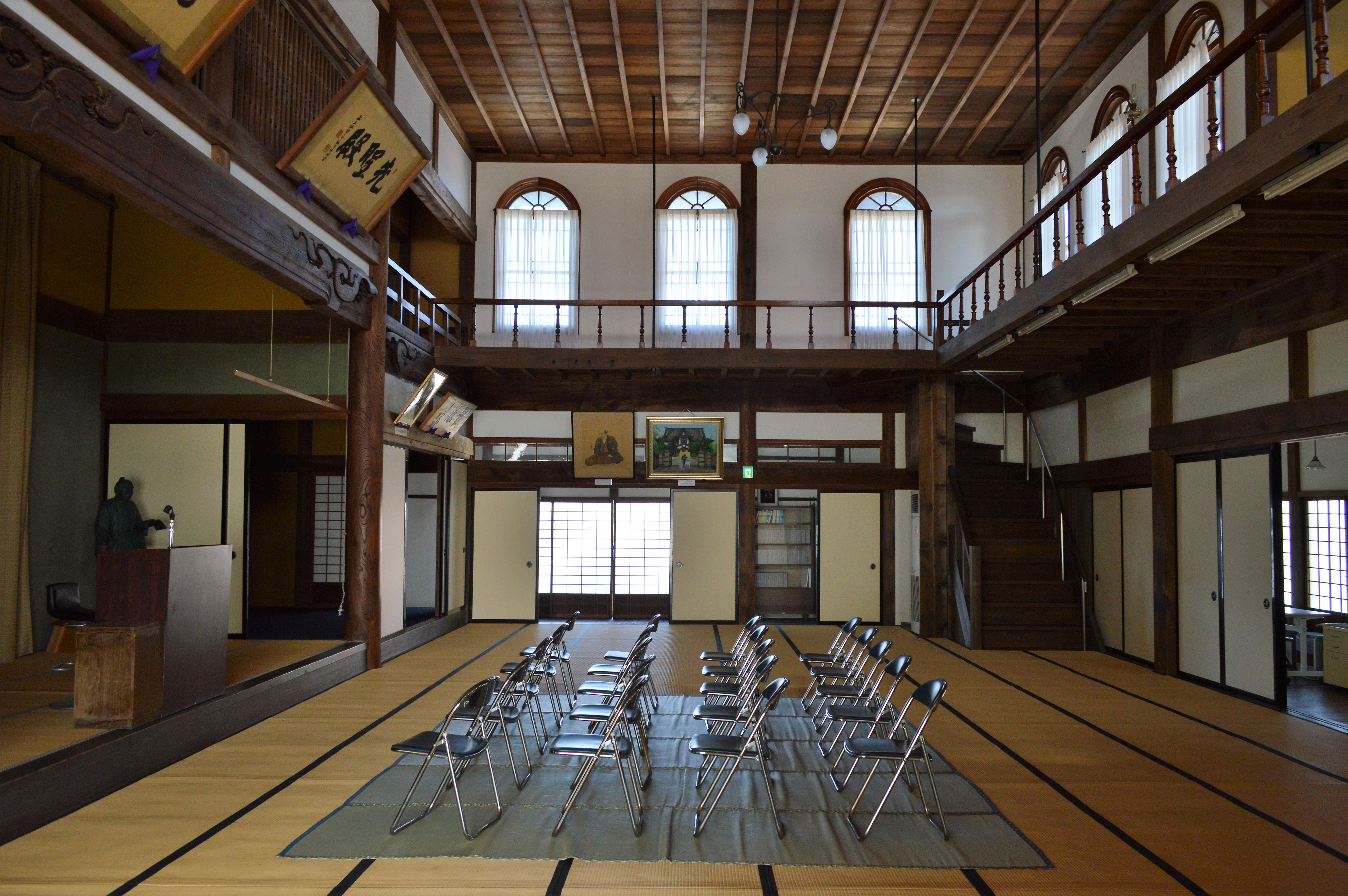 大日本報徳社大講堂大広間。